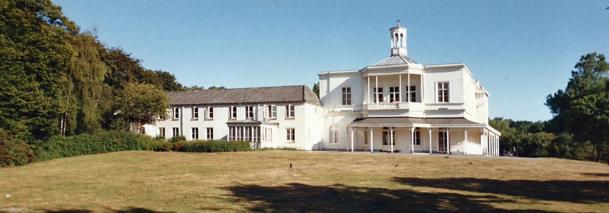 De jeugdherberg Ockenburgh in 1990